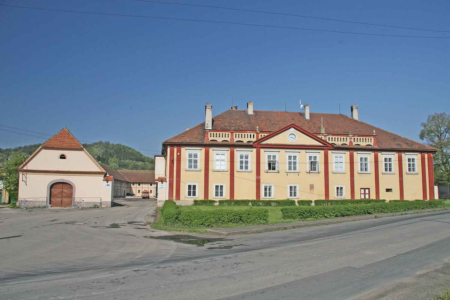 Barokní dvůr Tetíně u Berouna